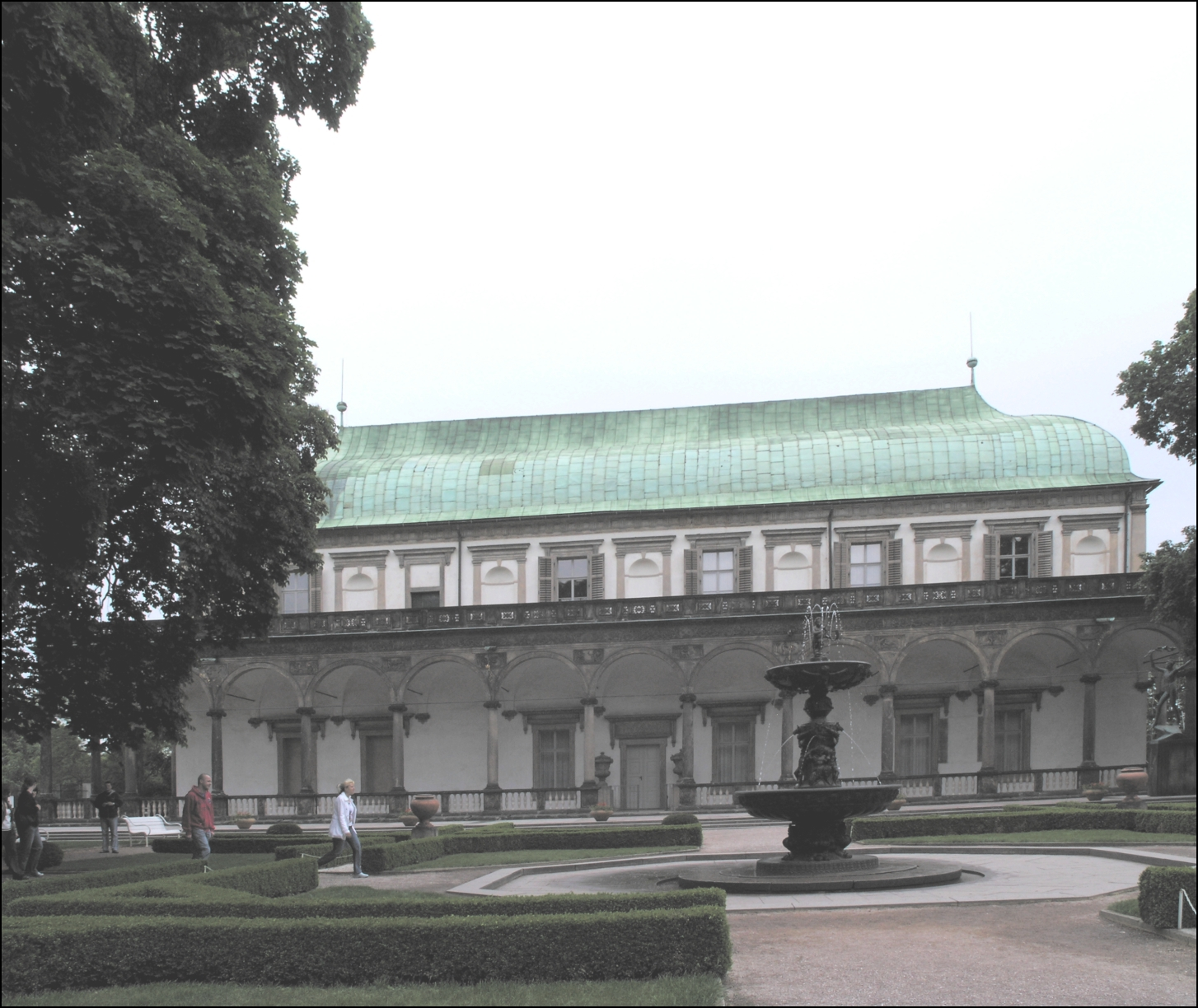 Letohrádek královny Anny v královské zahradě na Pražském hradě.